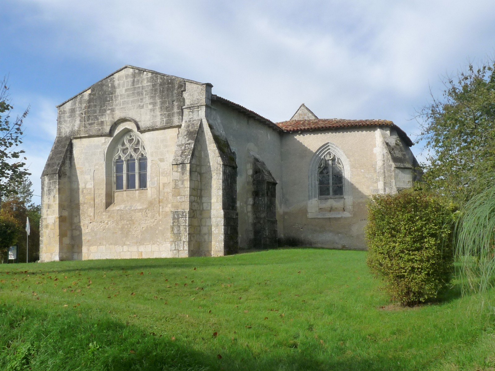 Eglise de St-Médard, Charente-Maritime, France